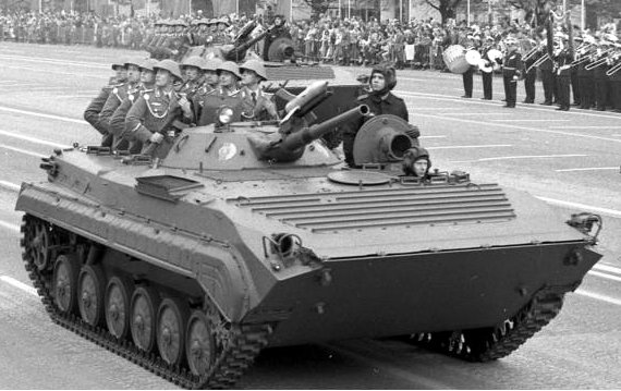 Factual corrections and alternative descriptions are encouraged separately from the original description. Additionally errors can be reported at this page to inform the Bundesarchiv. Original historic description: Berlin, 39. Jahrestag DDR-Gründung, Parade ADN-ZB / Mittelstädt / 7.10.88 /Berlin: Jahrtestag - Ehrenparade Anläßlich des 39. Jahrestags der Gründung der DDR fand in der Karl-Marx-Allee eine Ehrenparade der NVA statt. Die Strecke zwischen Strausberger- und Alexanderplatz war erfüllt vom Motorengeräusch moderner Schützenpanzer BMP-1.